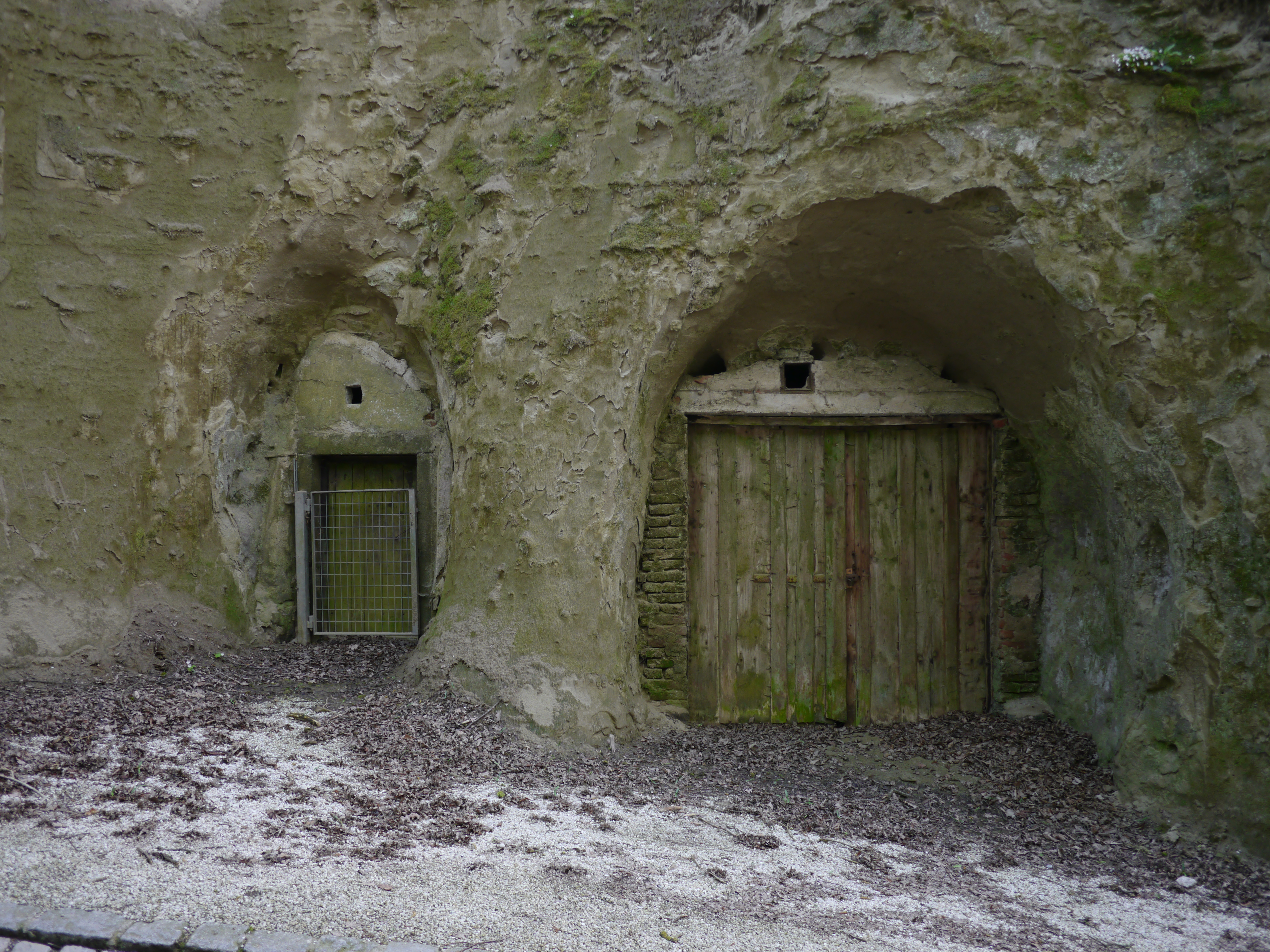 Erdkeller